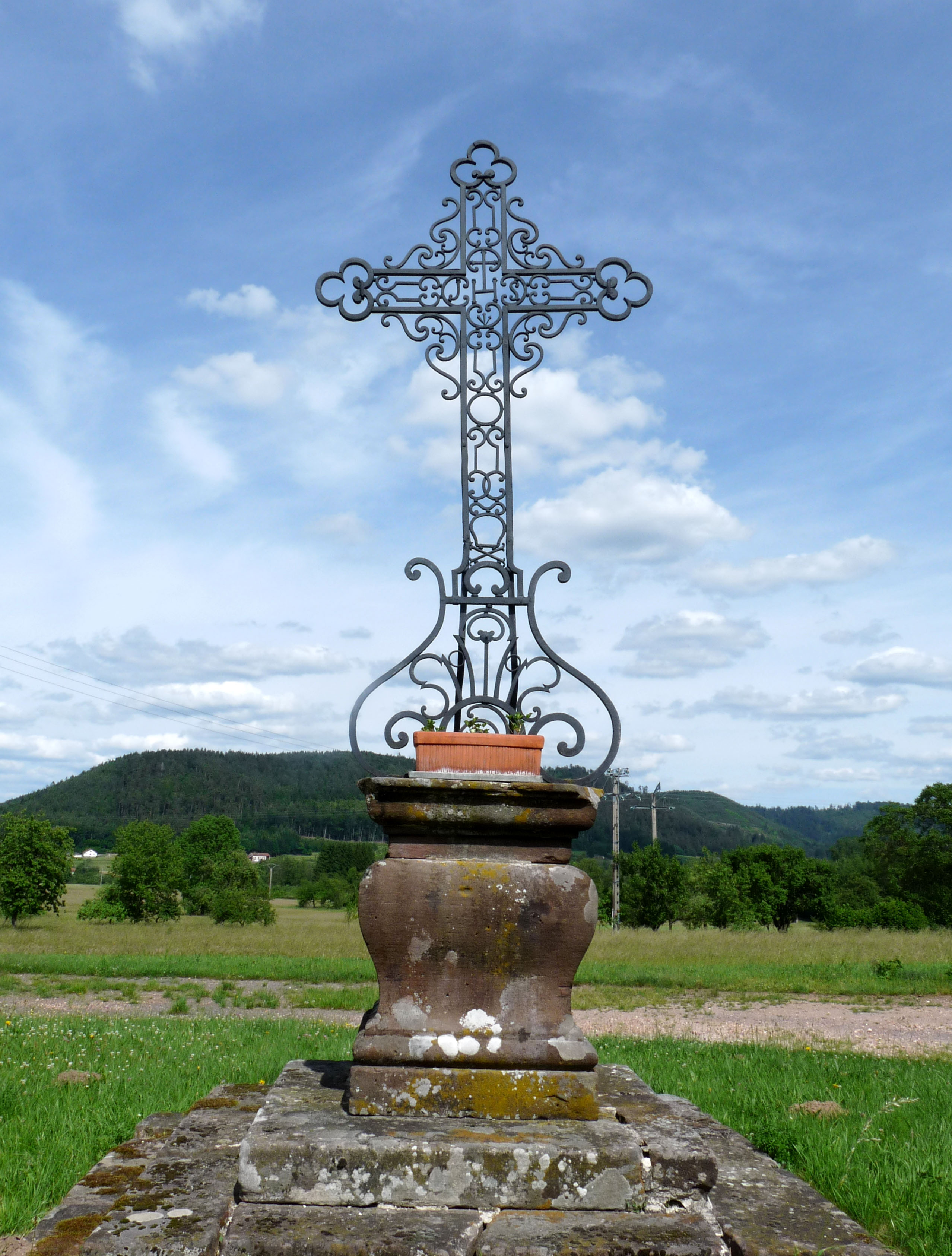 Croix en fer forgé du XVIIIe siècle à Brouvelieures (Vosges)